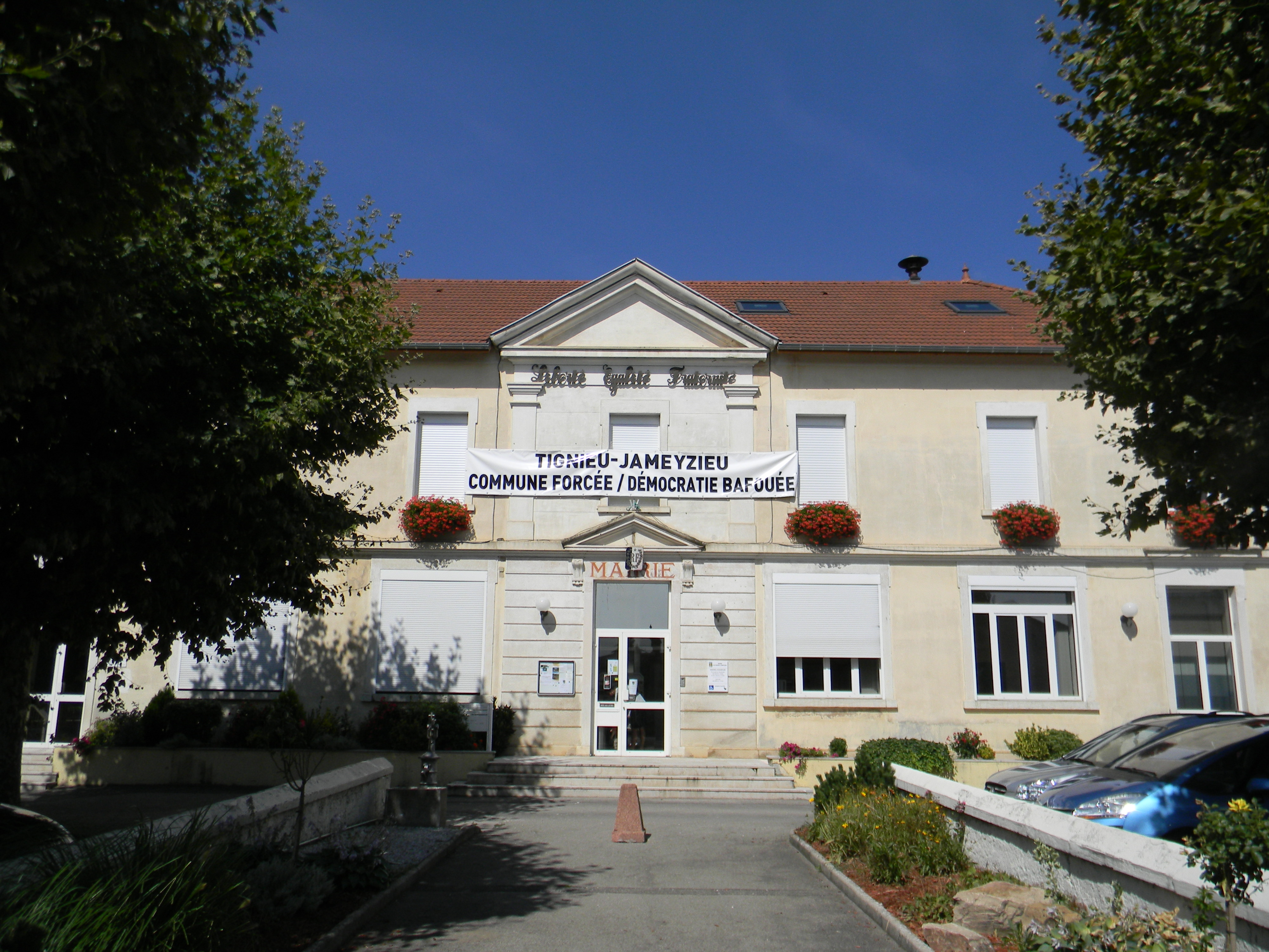 Mairie de Tignieu affichant une banderole "Tignieu-Jameyzieu - Commune forcée / Démocratie baffouée".